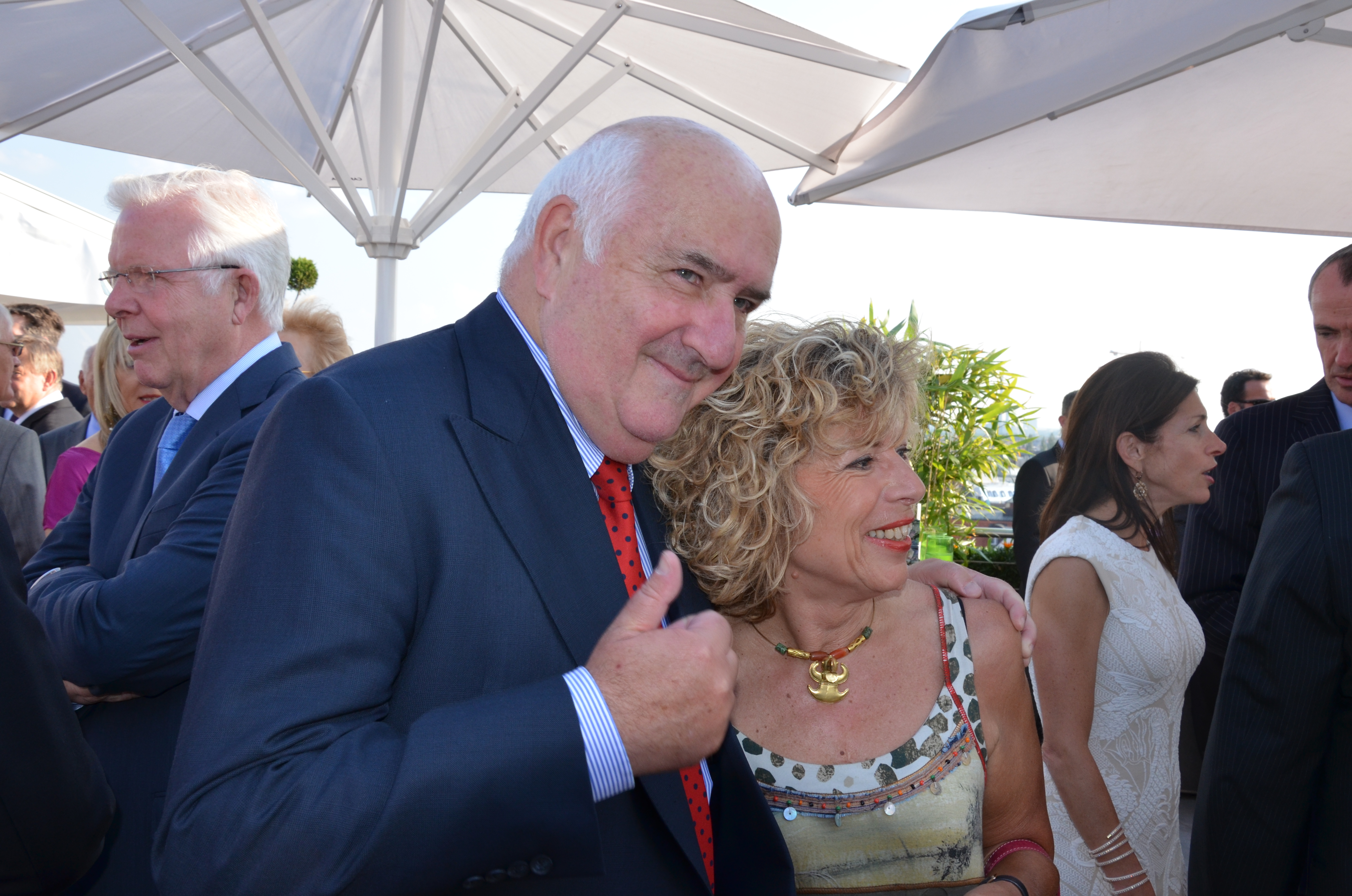 Professor Werner Weidenfeld und Professorin Gabriele Kokott-Weidenfeld